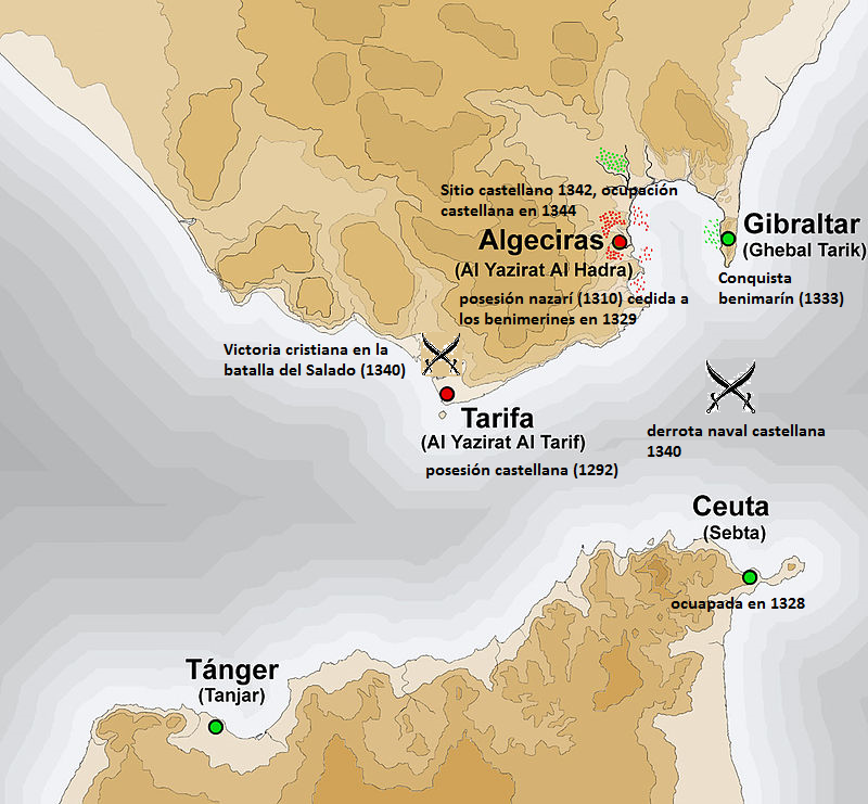 Evolución política del Estrecho desde 1329 a 1350 Rojo: Reino de Castilla Verde: Sultanato Benimerín Morado: Reino nazarí de Granada